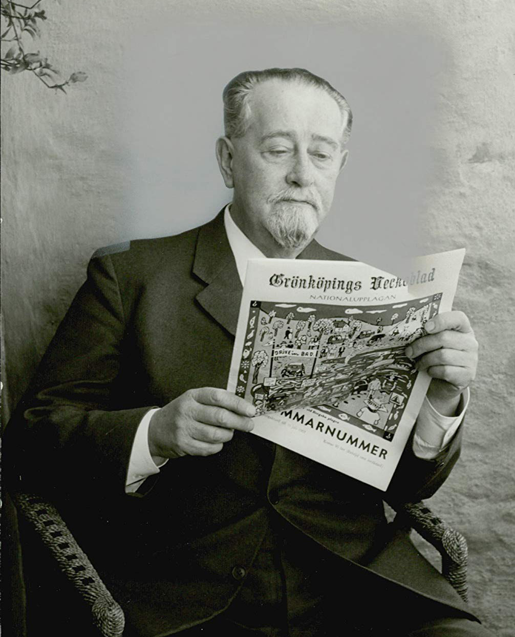 Seth Bremberg (1899-1963)